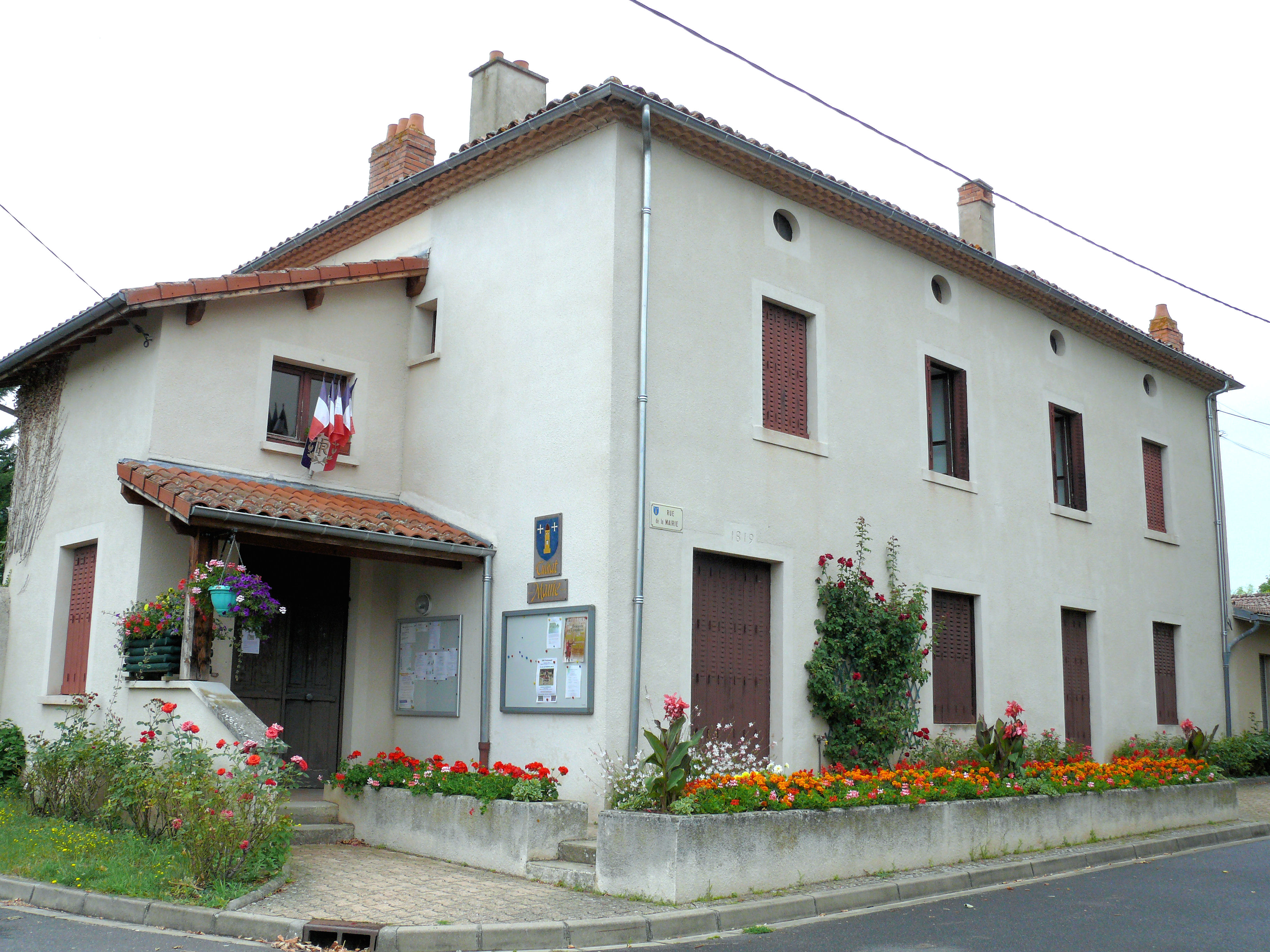 Culhat - Mairie